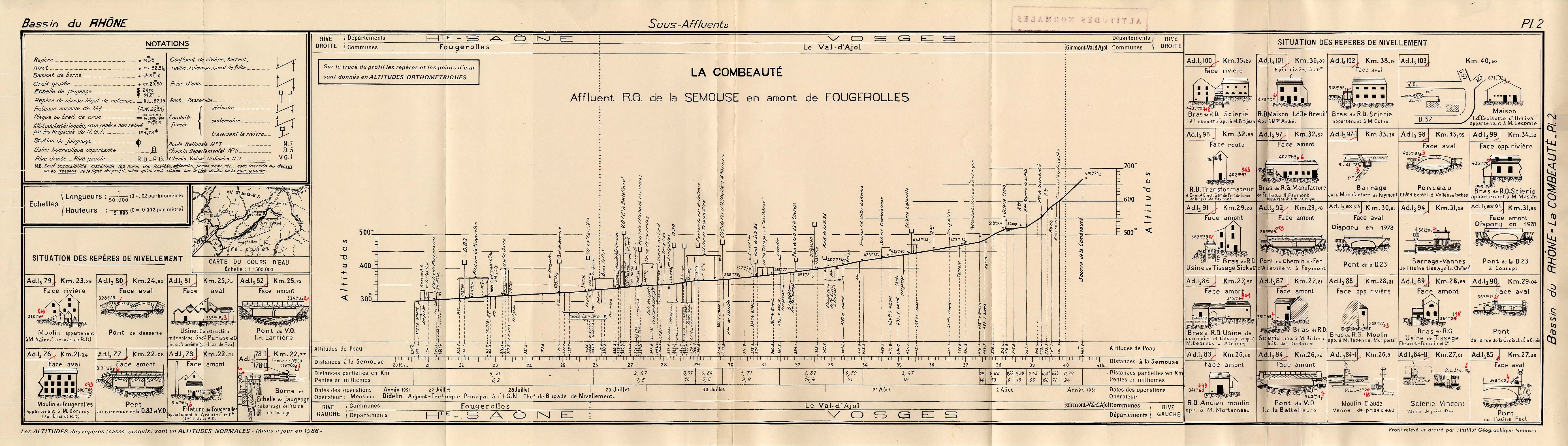 Profil altimètrique de la Combeauté entre sa source au Girmont Val-d'Ajol (88) et la commune de Fougerolles (70). Levé par M. Didelin, chef de Brigade nivellement à l'IGN.